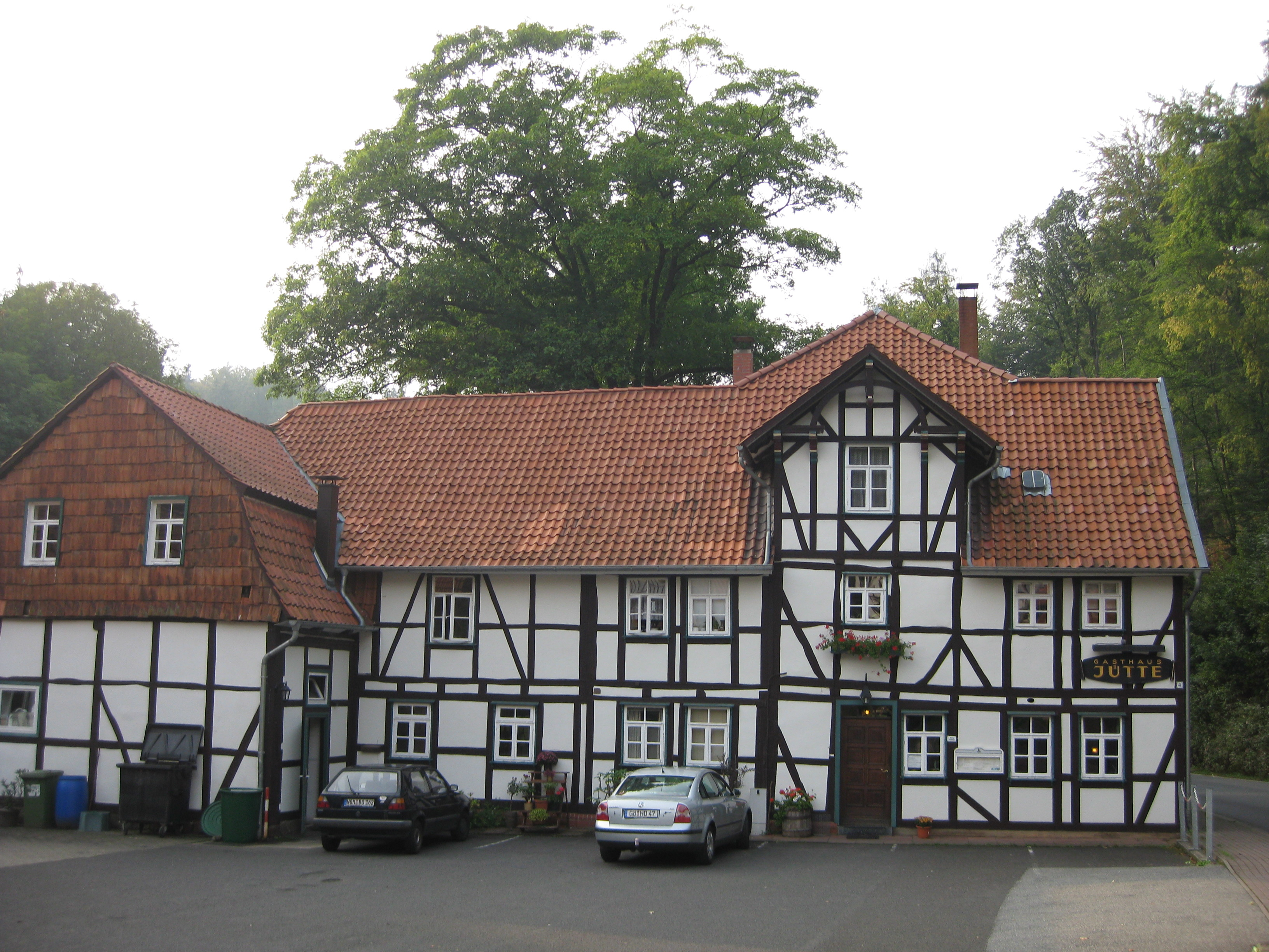 Gasthaus Mutter Jütte in Bremke (Gemeinde Gleichen). Historisches Göttinger Ausflugslokal an der Straße nach Heiligenstadt.